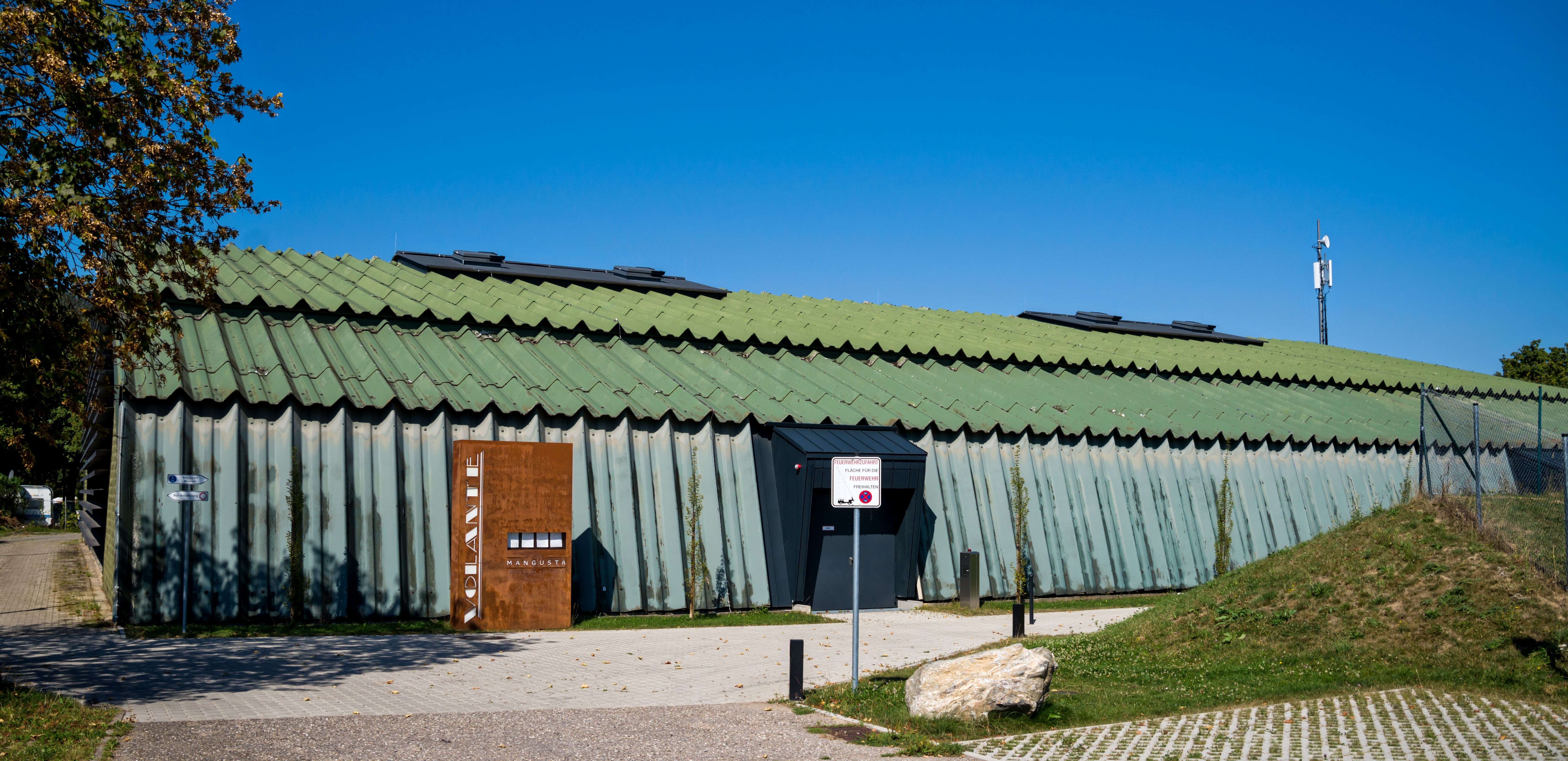 Das Volante Oldtimermuseum in Kirchzarten